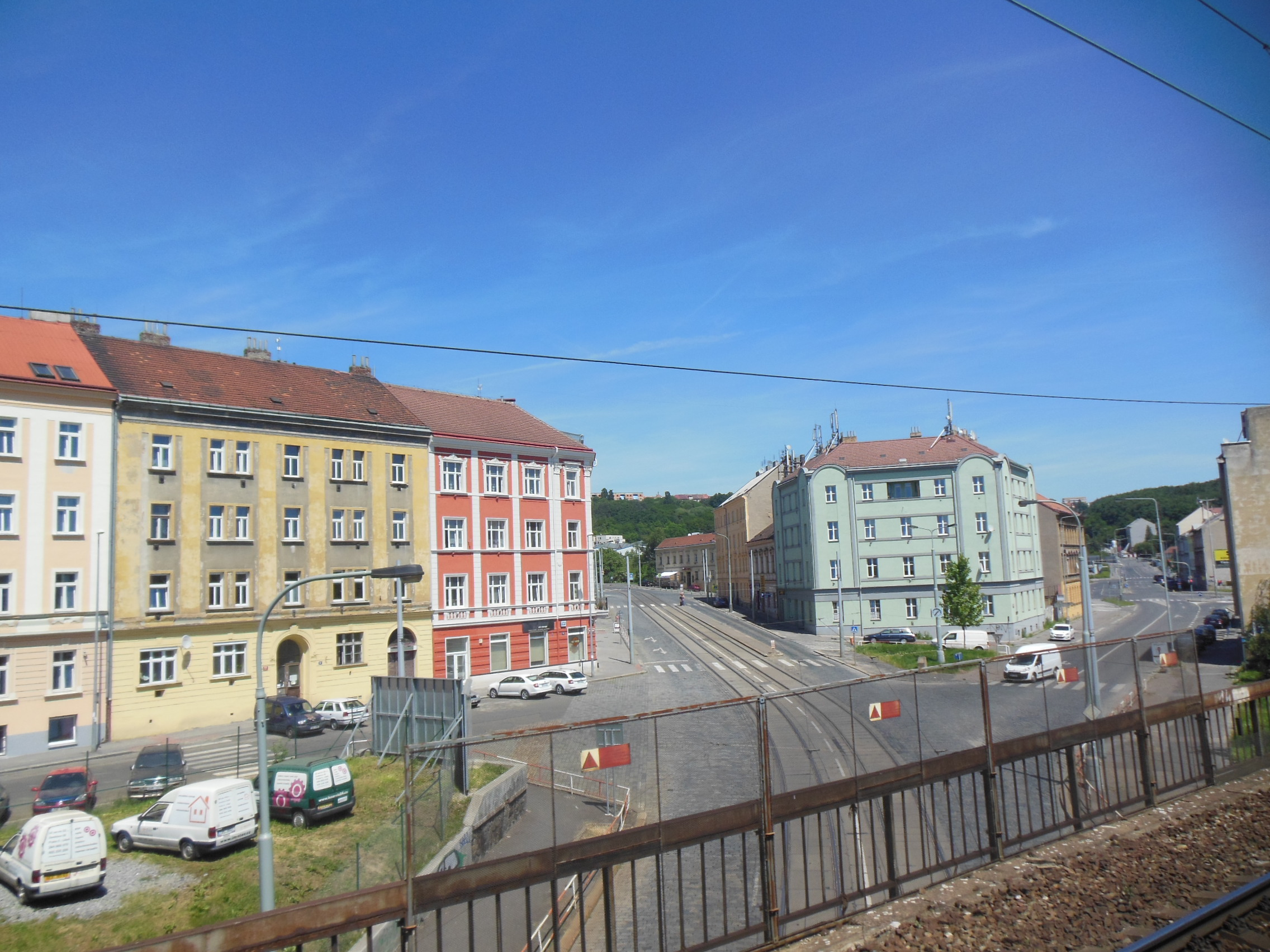 Praha-Libeň. Křižovatka ulic Kandertova, Zenklova a Prosecká, pohled z vlaku.